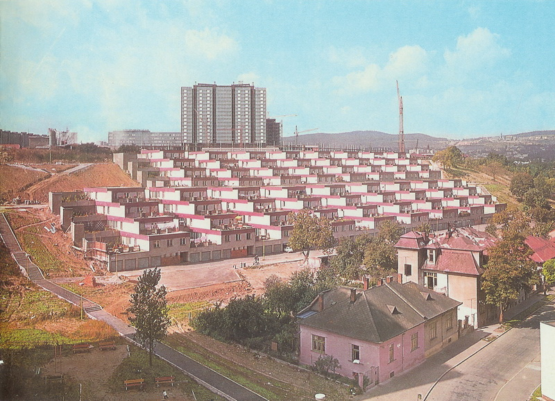 Átriové domy Košice